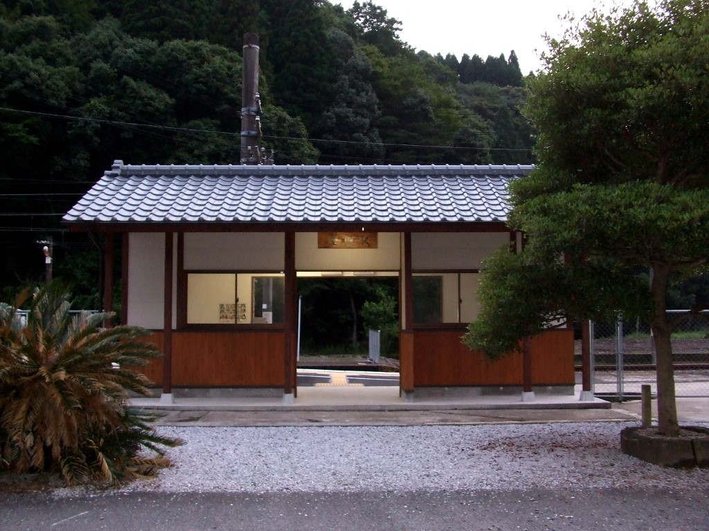 撮影者：葉月裕一（2007年8月16日撮影）